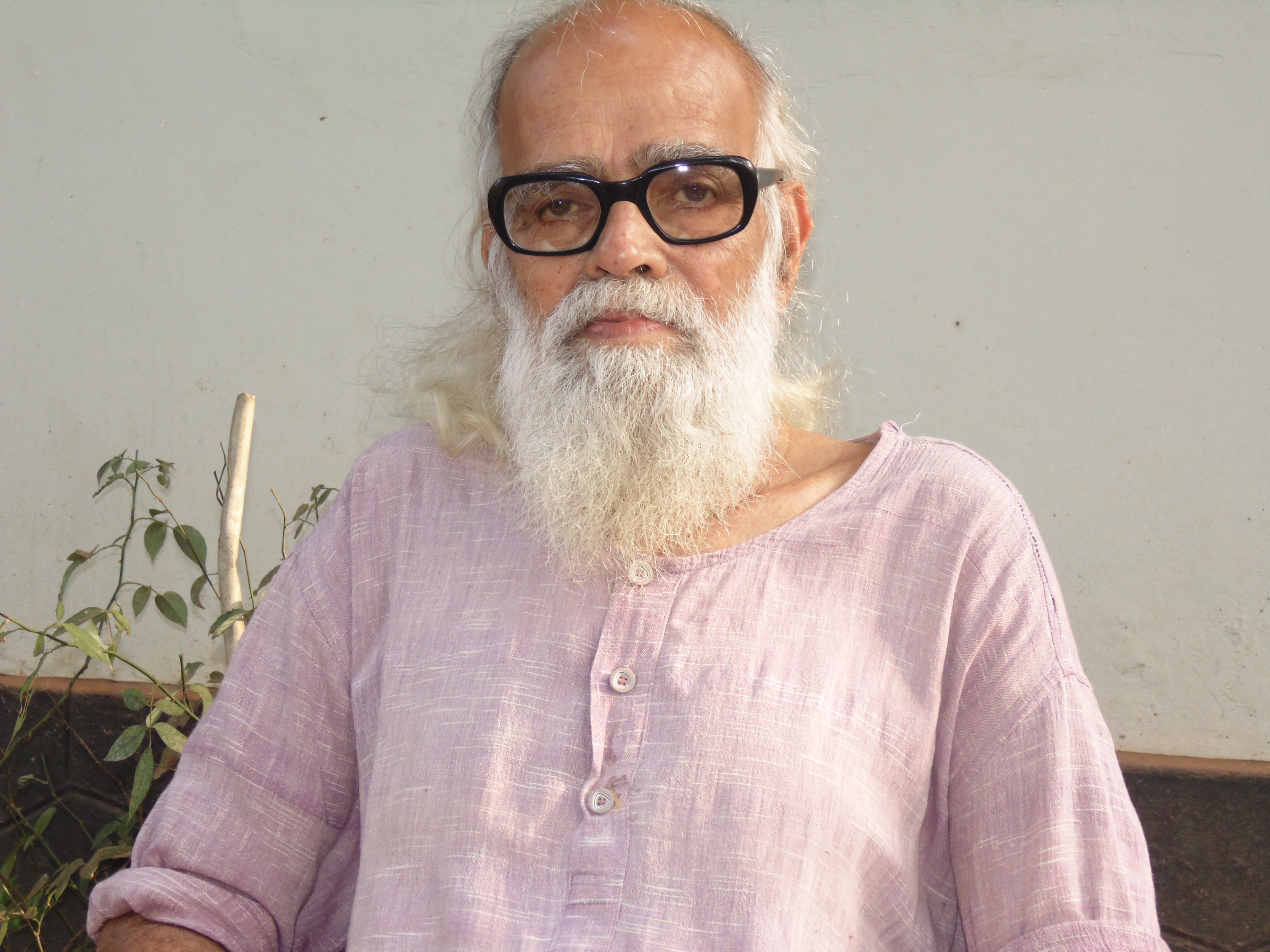 മലയാളത്തിലെ അറിയപ്പെടുന്ന കവിയും ഗാനരചയ്താവുമായ പരത്തുള്ളി രവീന്ദ്രന്‍ (Parattulli Raveendran )